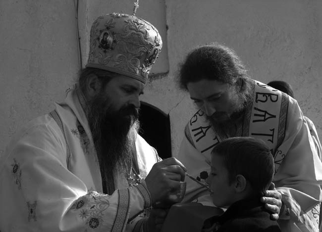 Косово и Метохија: Срби на Косову и Метохији су од малена велики верници. Фотографије из пројекта "Корени душе". Фото:Дарко Дозет